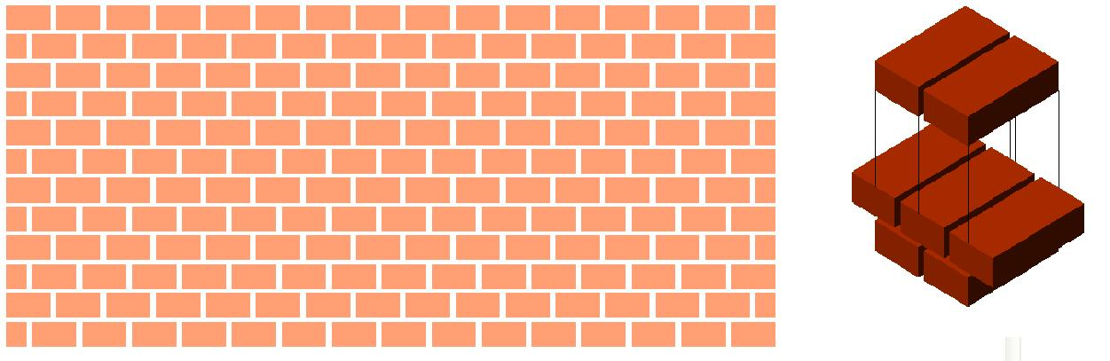 Aparejo a tizones